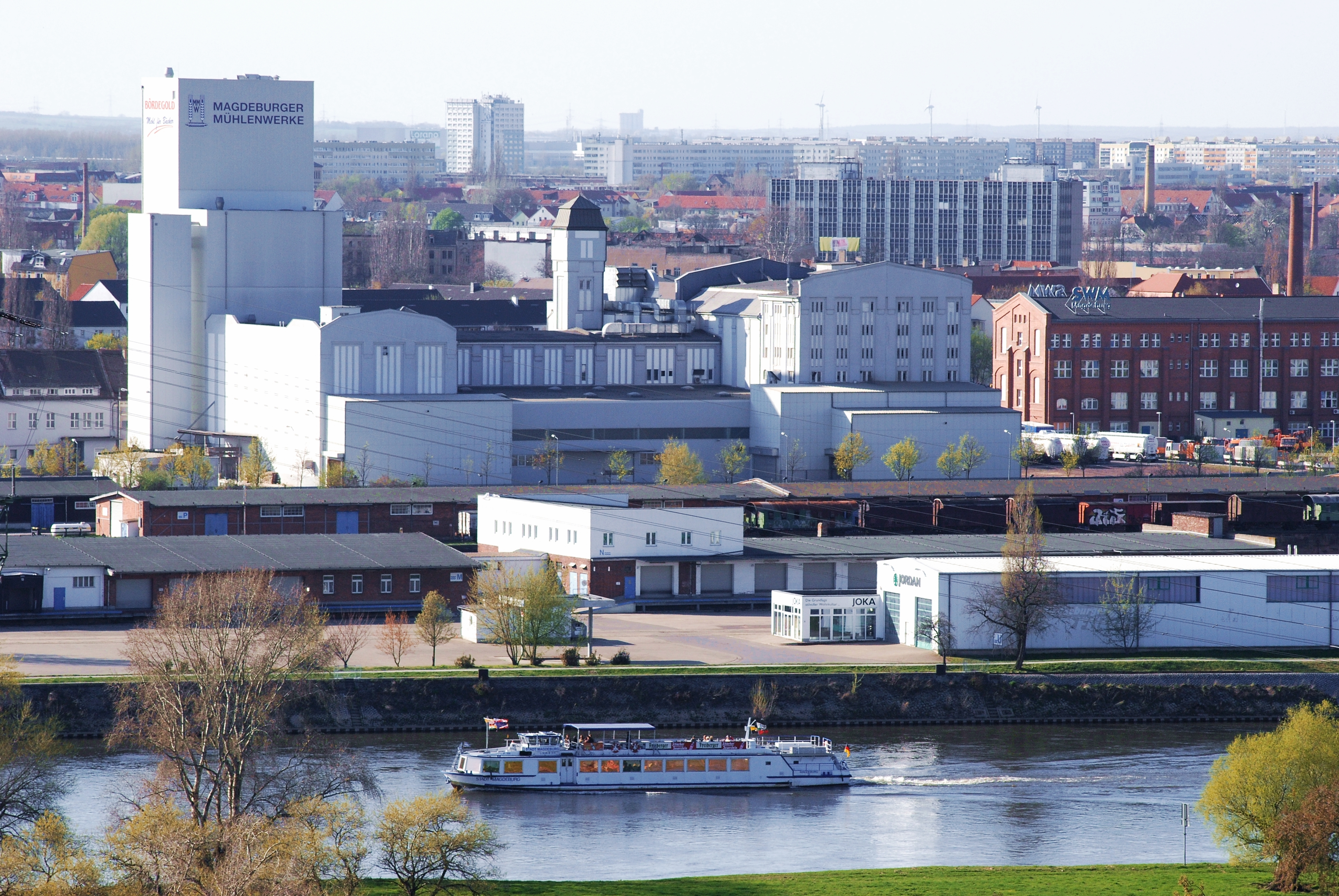 Gewerbegebiet im Magdebuger Handelshafen